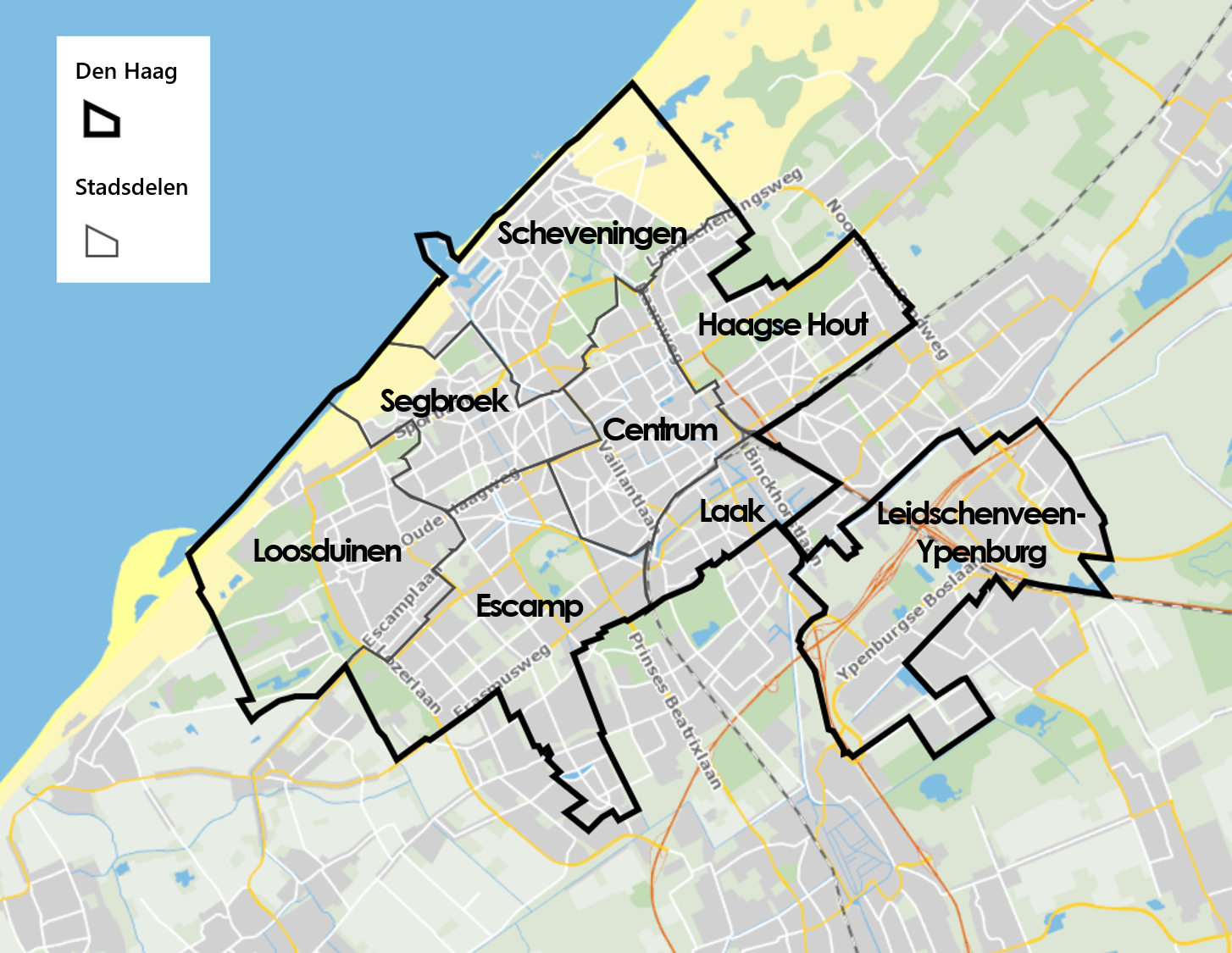 Den Haag telt acht stadsdelen.